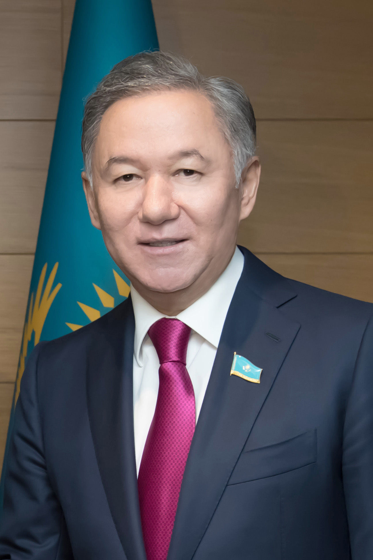 Нигматулин Нурлан Зайруллаевич